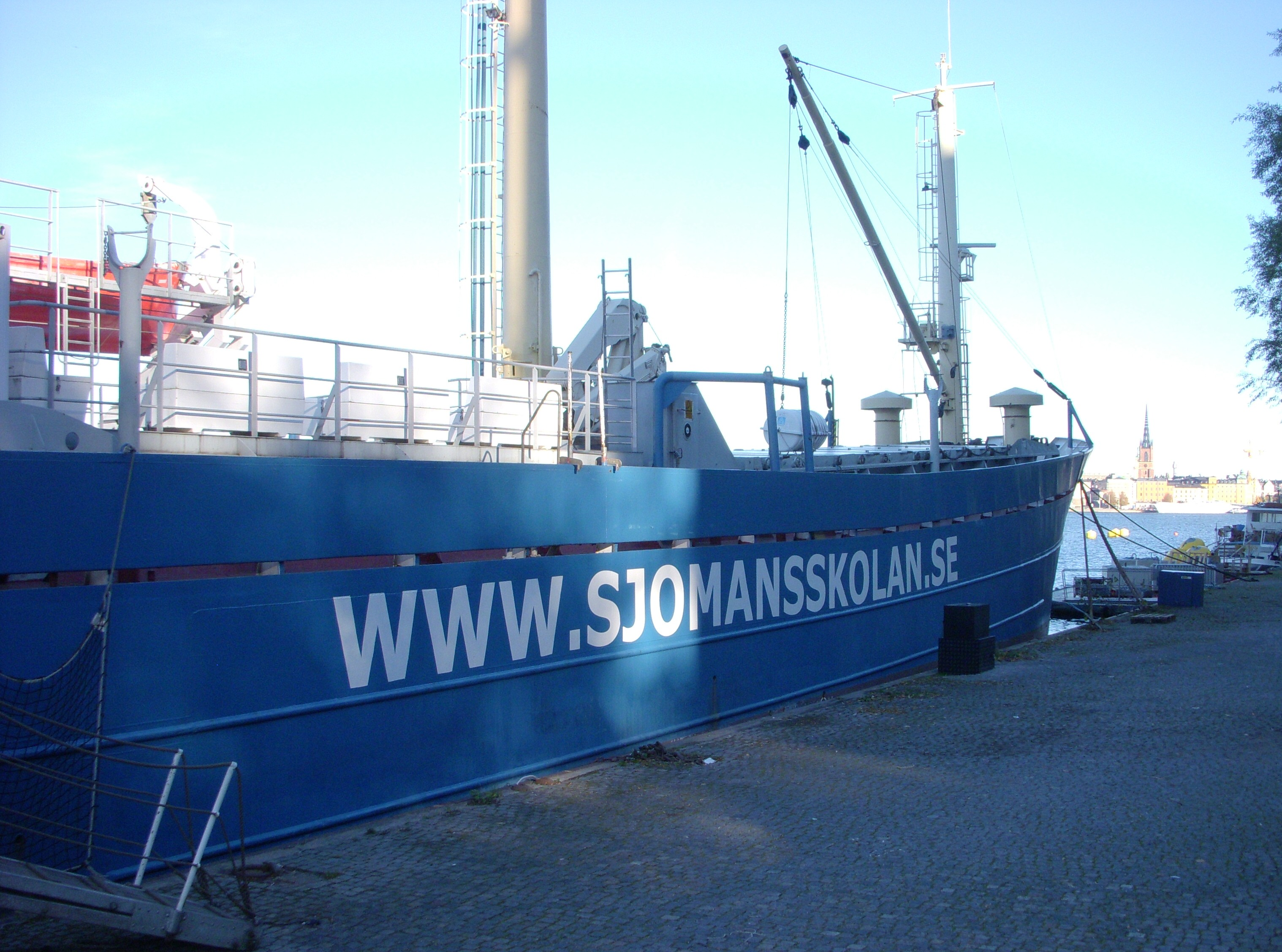 Sjömansskolan på M/S Polfors vid Söder Mälarstrand